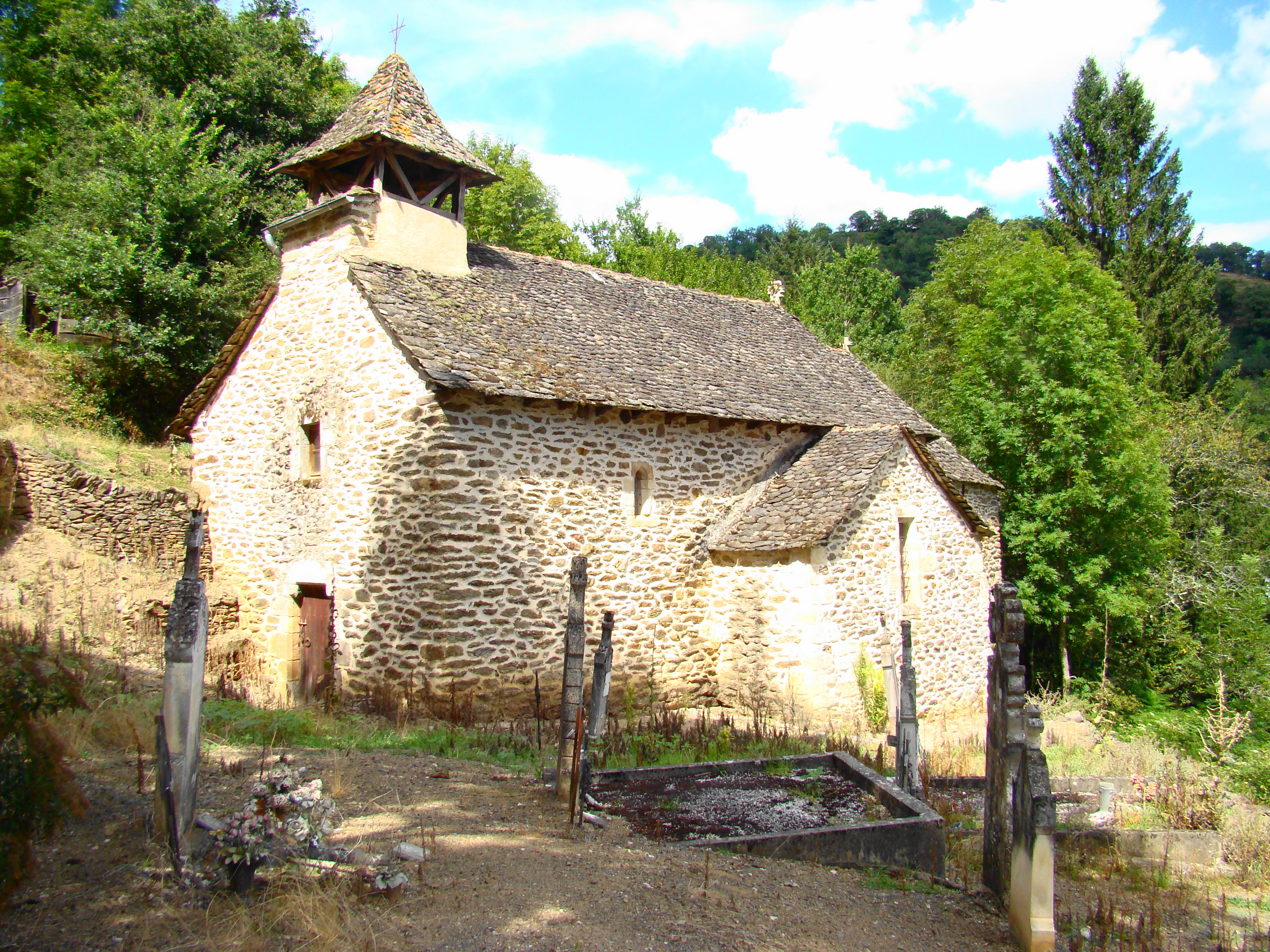 Chapelle pré-romane dont l'origine remonte au XIe siècle - La Salvetat-Peyralès (Aveyron)